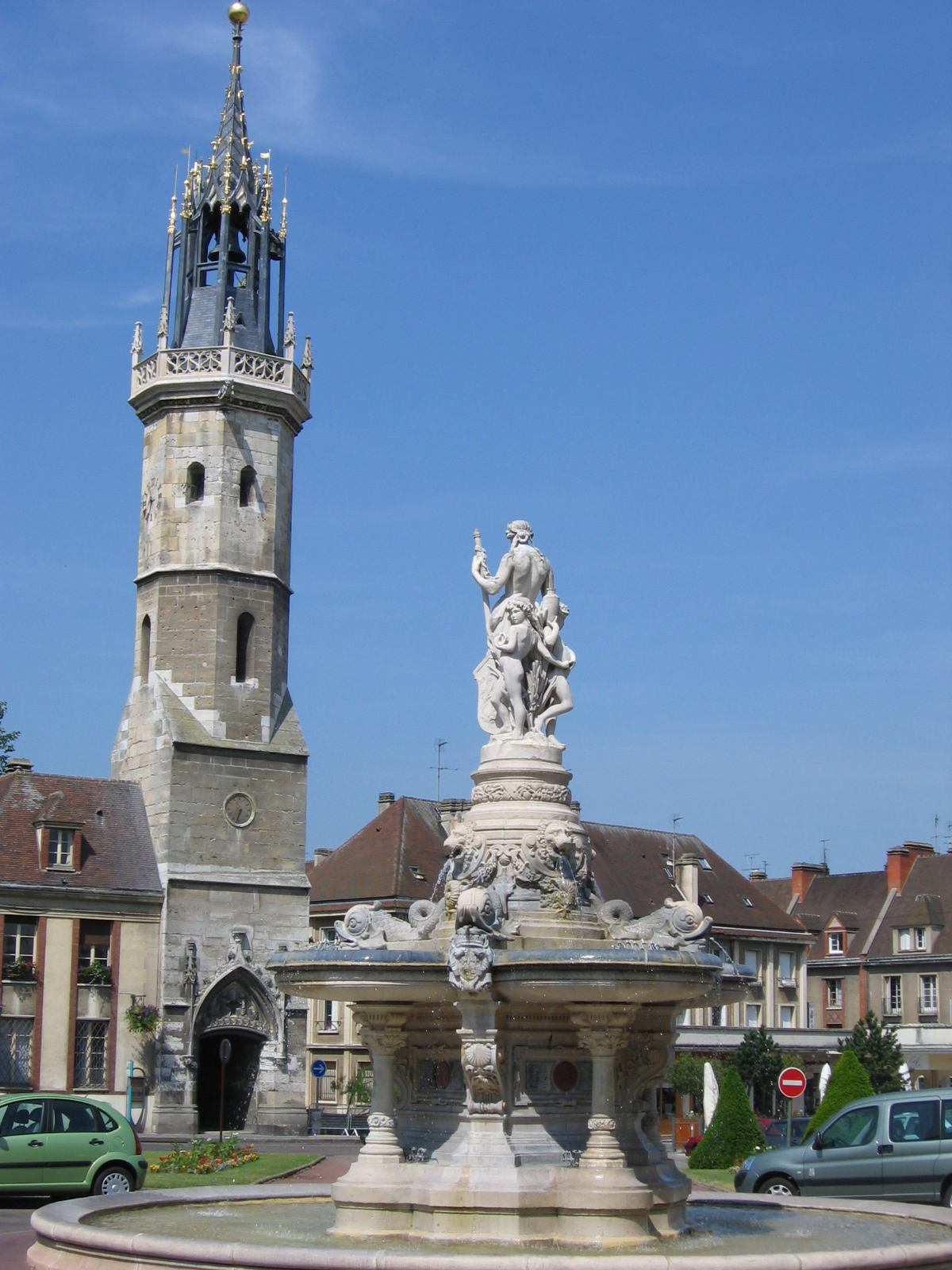 Tour de l'Horloge et fontaine monumentale, Évreux (Eure)